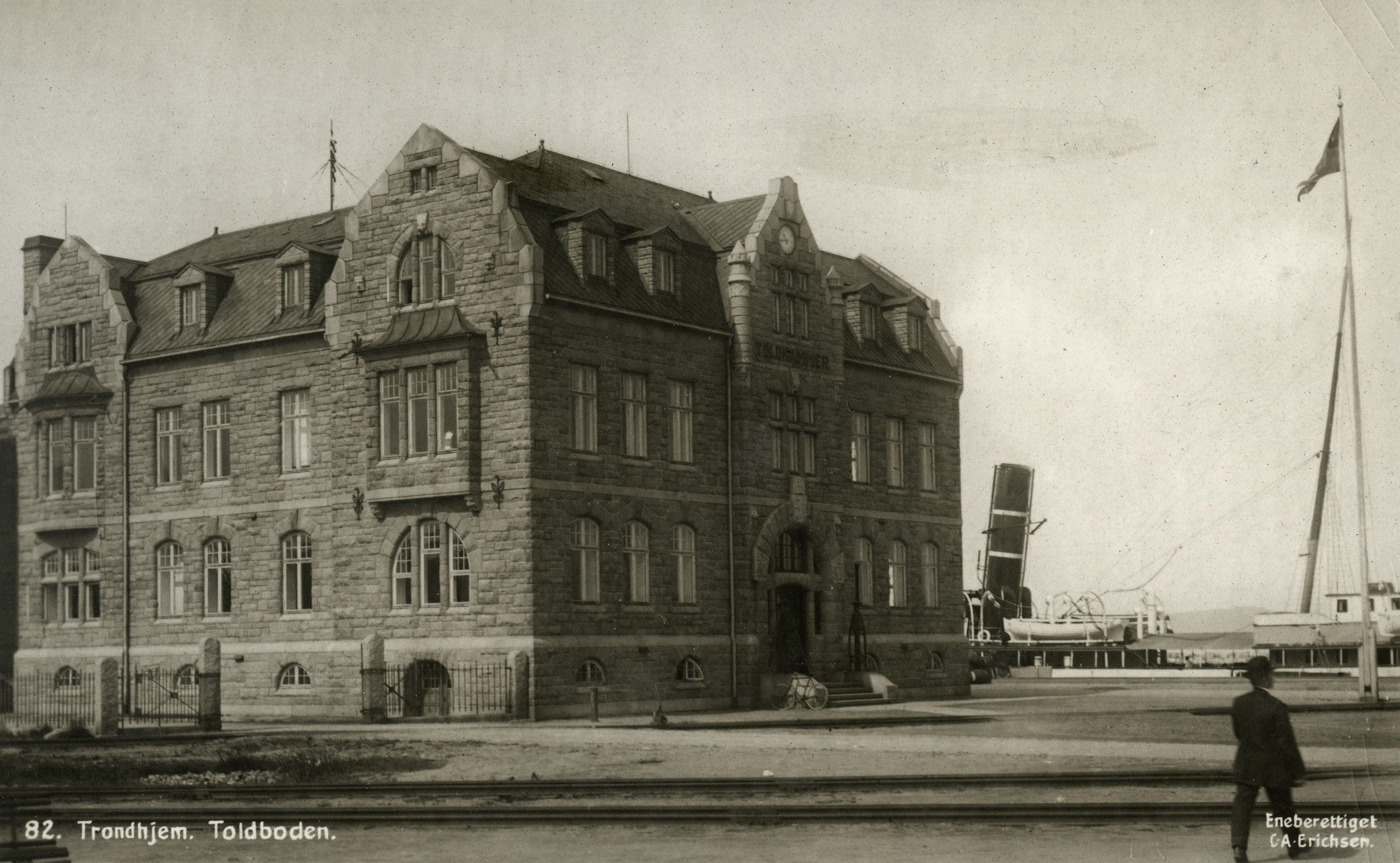 Format: Postkort. År: Tidlig 1900-tall, ca. 1910 - 1915. Om fotografen: ERICHSEN, C. A. - Drøbak og Bodø ca. 1910. Ett av hans bilder datert 1910 er med i Drøbakboken, og han har fotografert landskaper og brevkort i Bodø omtrent samtidig. Hentet fra Bonge, Susanne: Eldre norske fotografer. Fotografer og amatørfotografer i Norge frem til 1920 (Universitetsbiblioteket i Bergen)